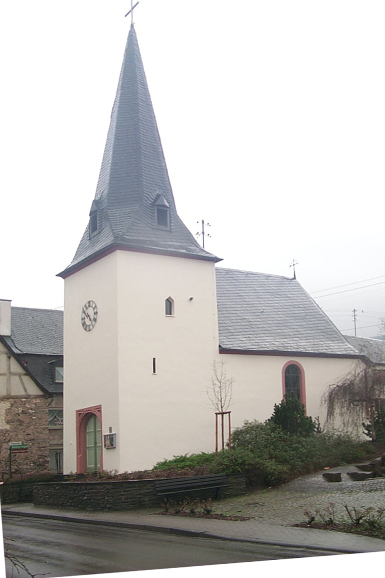 Evangelische Kirche Andel (Ortsteil von Bernkaste-Kues)